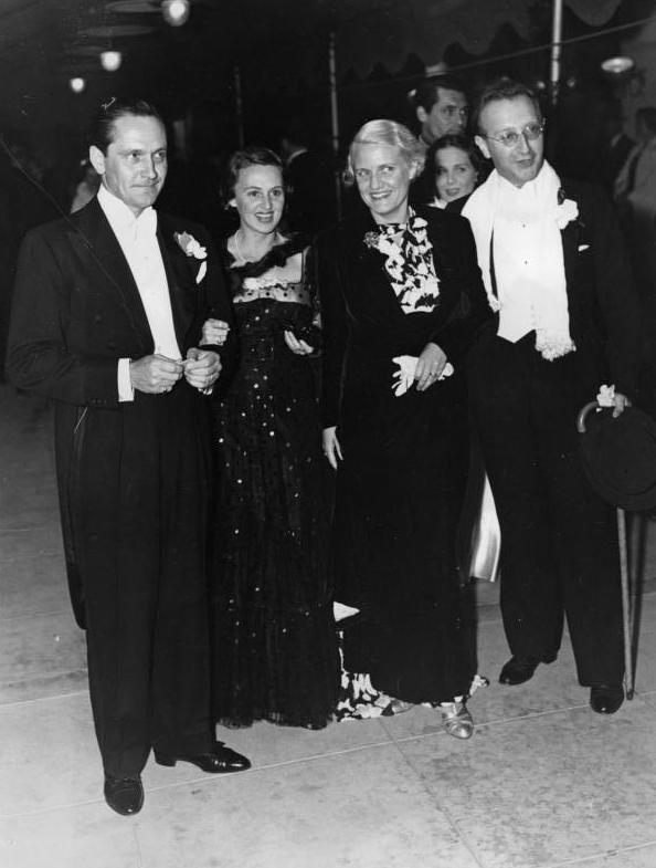 Ehepaare March, Prinz zu Löwenstein. Notables at film premiere at the Carthay Circle Theater, in Los Angeles, California: Mr. and Mrs. Fredric March (left), and Prince and Princess Löwenstein, pictured as they attended the premiere of "Anthony Adverse". Fredric March plays the title role in the film. March is married to the actress Florence Eldridge. Löwenstein, Prinz, Wertheim-Freudenberg, Hubertus zu Dr. jur., 1936 LA358018 Credit Line (ACME) 7/31/36 NY , FOR [Los Angeles.- vlnr: Fredric March mit Ehefrau Florence Eldridge, Helga Maria zu Löwenstein-Wertheim-Freudenberg (geborene Schuylenburg) mit Ehemann Hubertus Prinz zu Löwenstein-Wertheim-Freudenberg bei der Filmpremiere von "Anthony Adverse" am 29.7.1936] Abgebildete Personen: Löwenstein-Wertheim-Freudenberg, Hubertus Prinz zu: 1906-1984; Journalist, Historiker, MdB, FDP, DP, CDU, Deutschland March, Frederic: Schauspieler, USA